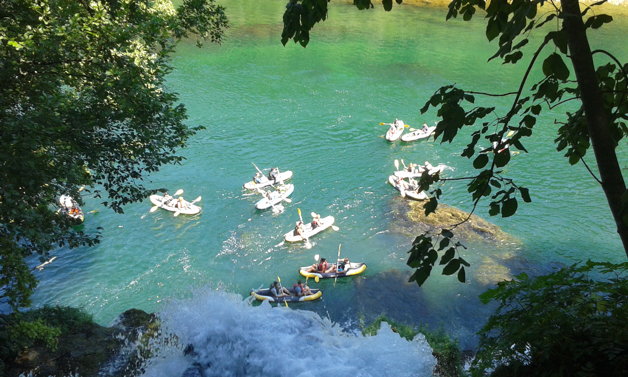 Kajakaši na Drini